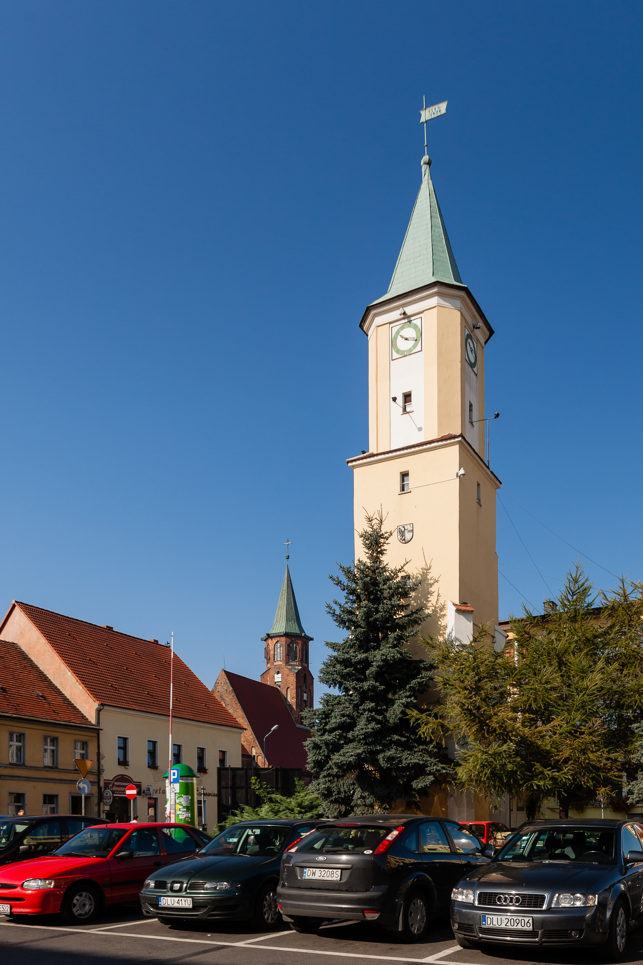 Ścinawa - wieża ratusza (zabytek nr A/3345/1776 z dn. 11.07.66)